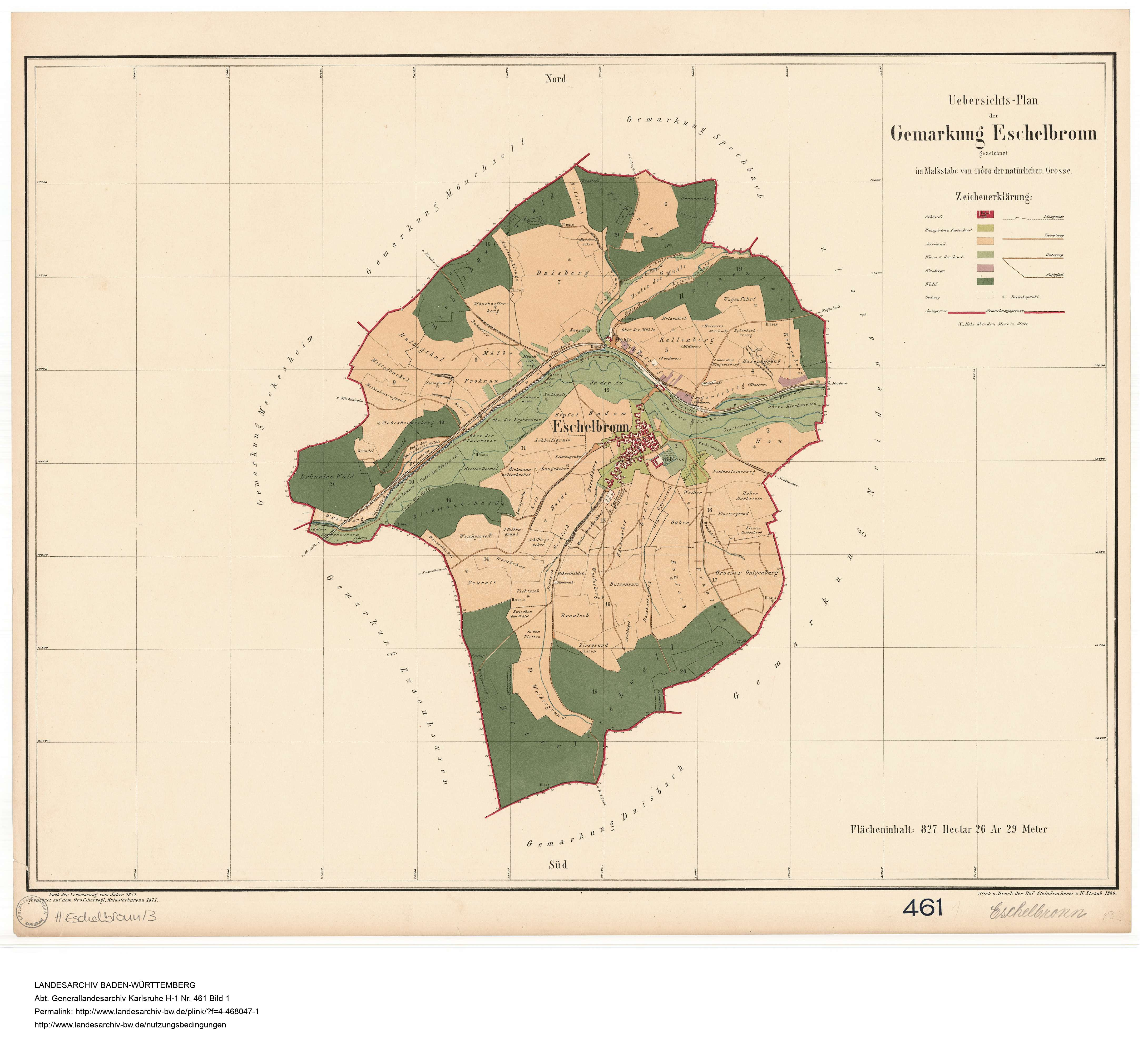 Gemarkungspläne der Gemeinde Eschelbronn. Maßstab 1:10000